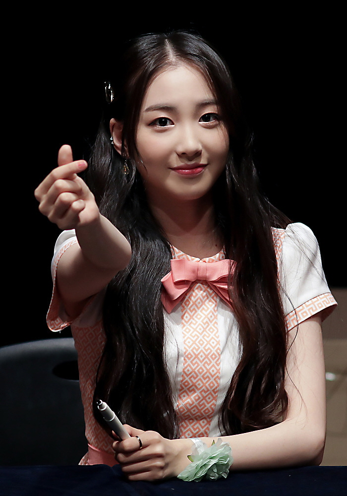 170716 엘리스 유경 강남 팬사인회 by SinC